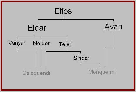 Es un sencillo esquema de las principales ramas raciales de los Elfos en la obra de J.R.R. Tolkien